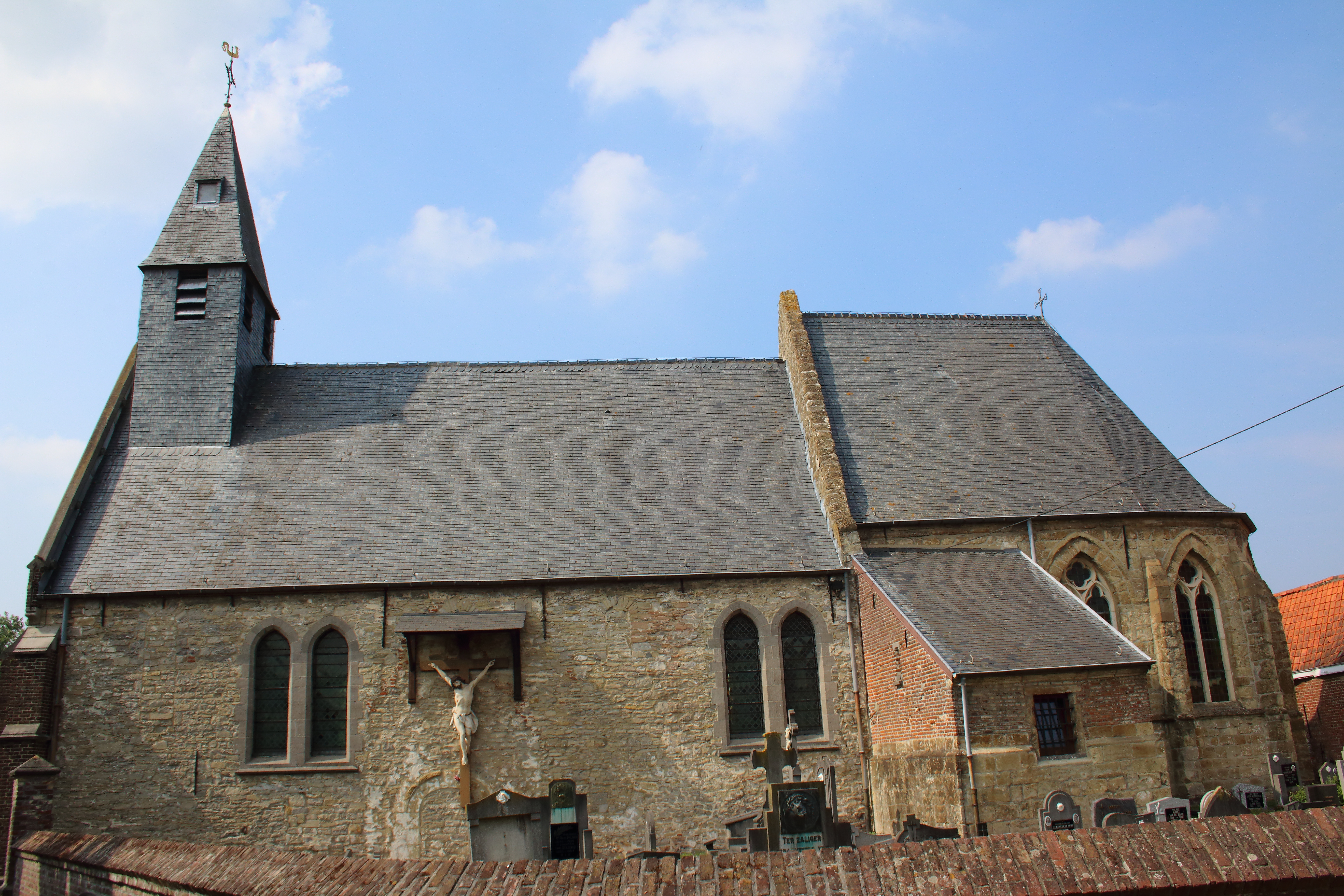 Paulatem, Zwalm, Vlaanderen, België